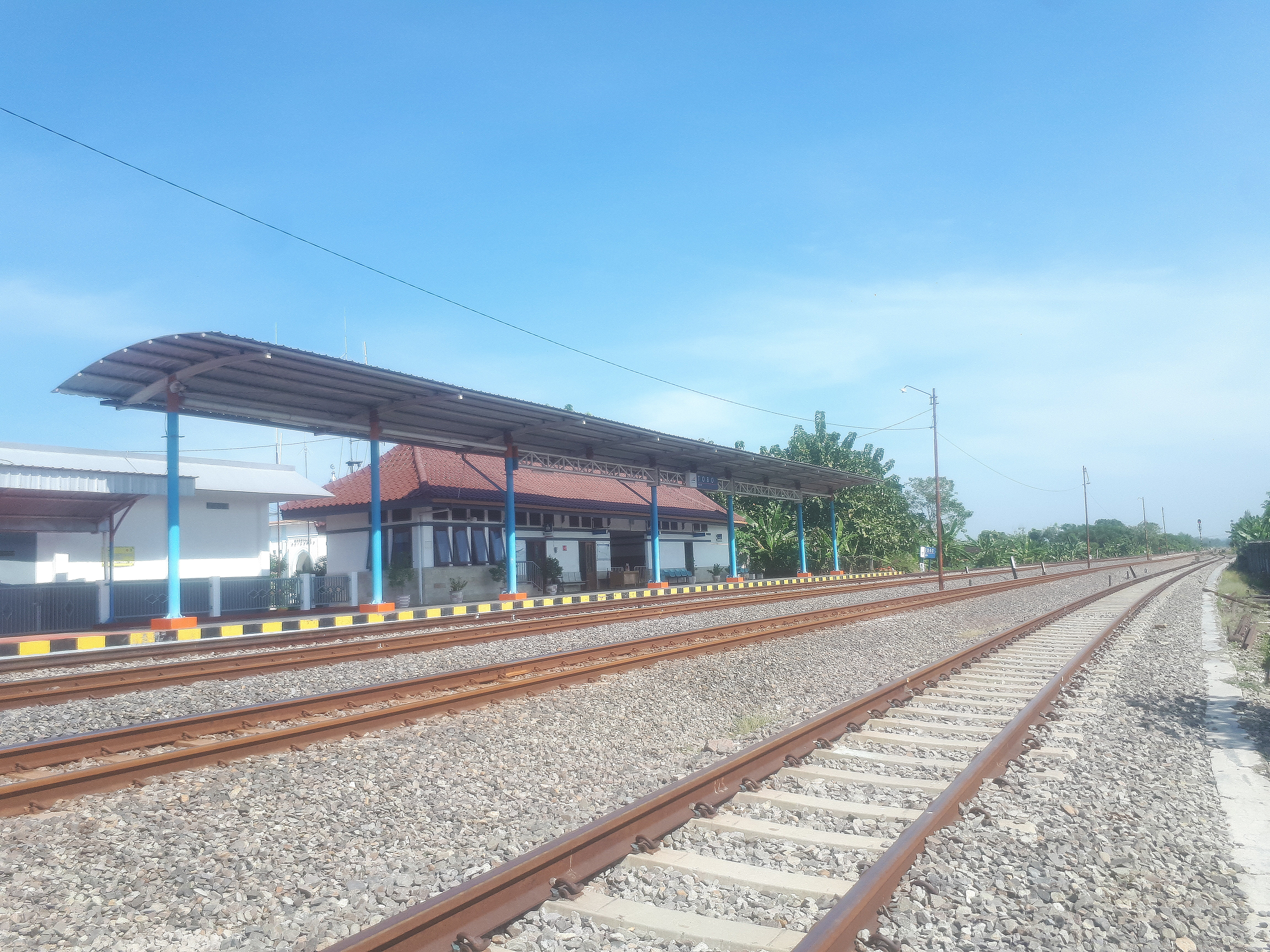 Emplasemen Stasiun Tobo, 2020